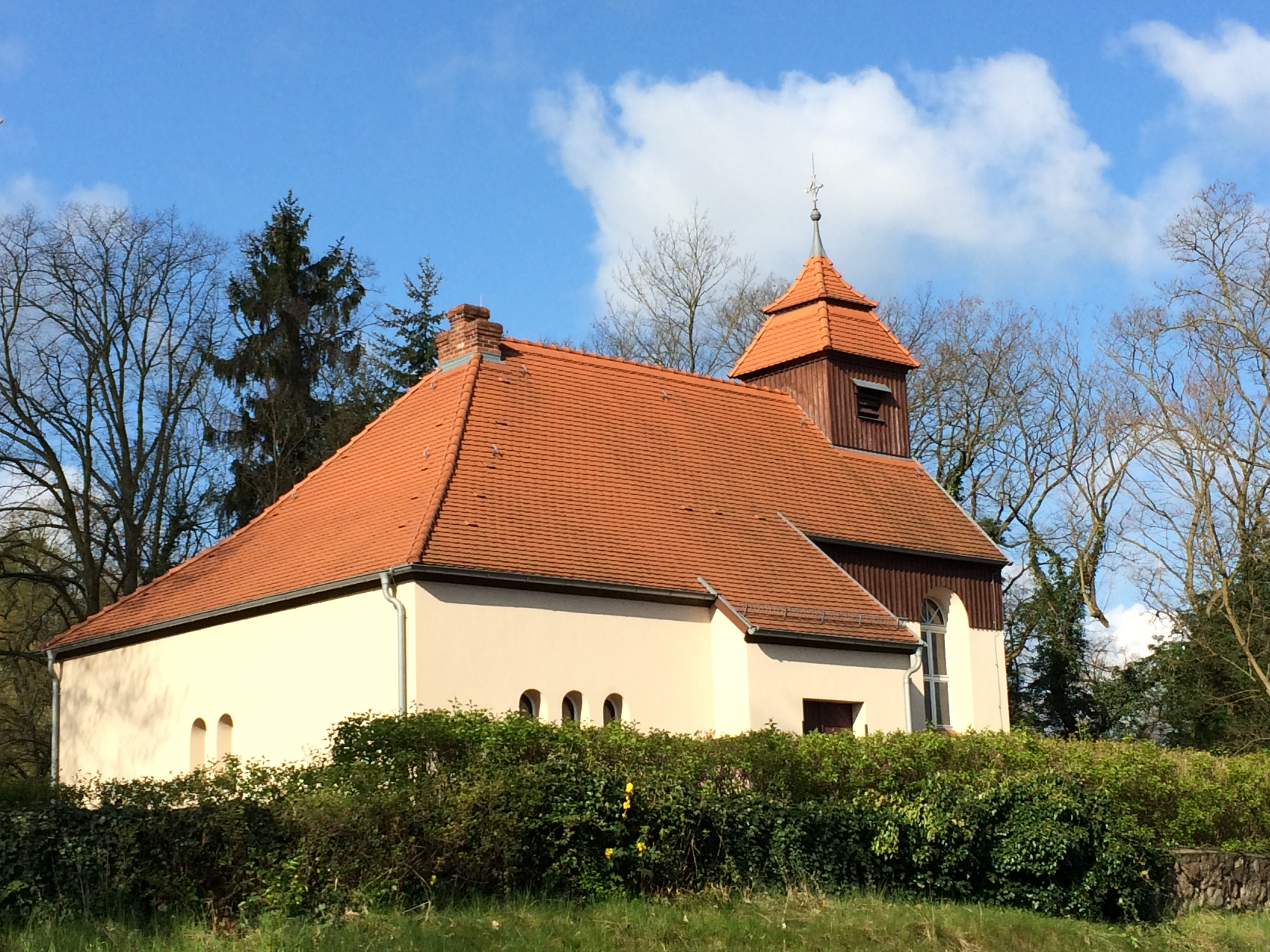 Denkmalgeschützte Friedhofskapelle in der Buchholzer Straße 17 in Teupitz